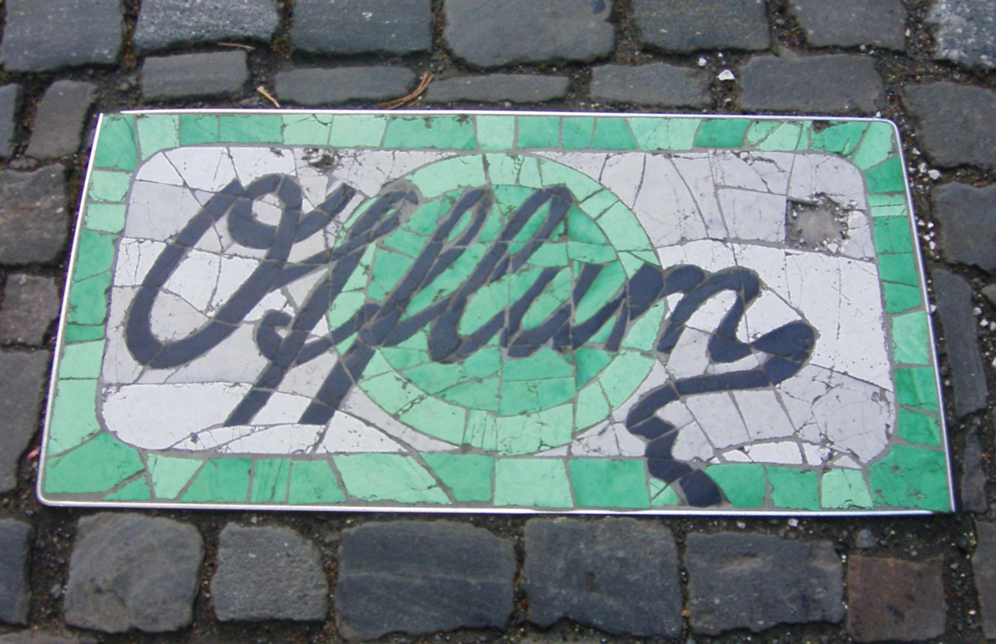 Mosaik mit dem Namenszug „Offlum“